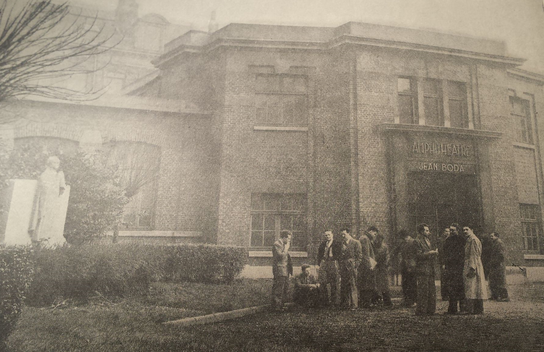 IDN Institut industriel du Nord, rue Jeanne d'Arc Lille, amphitheatre Jean Boda 1954